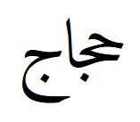 Хаджадж